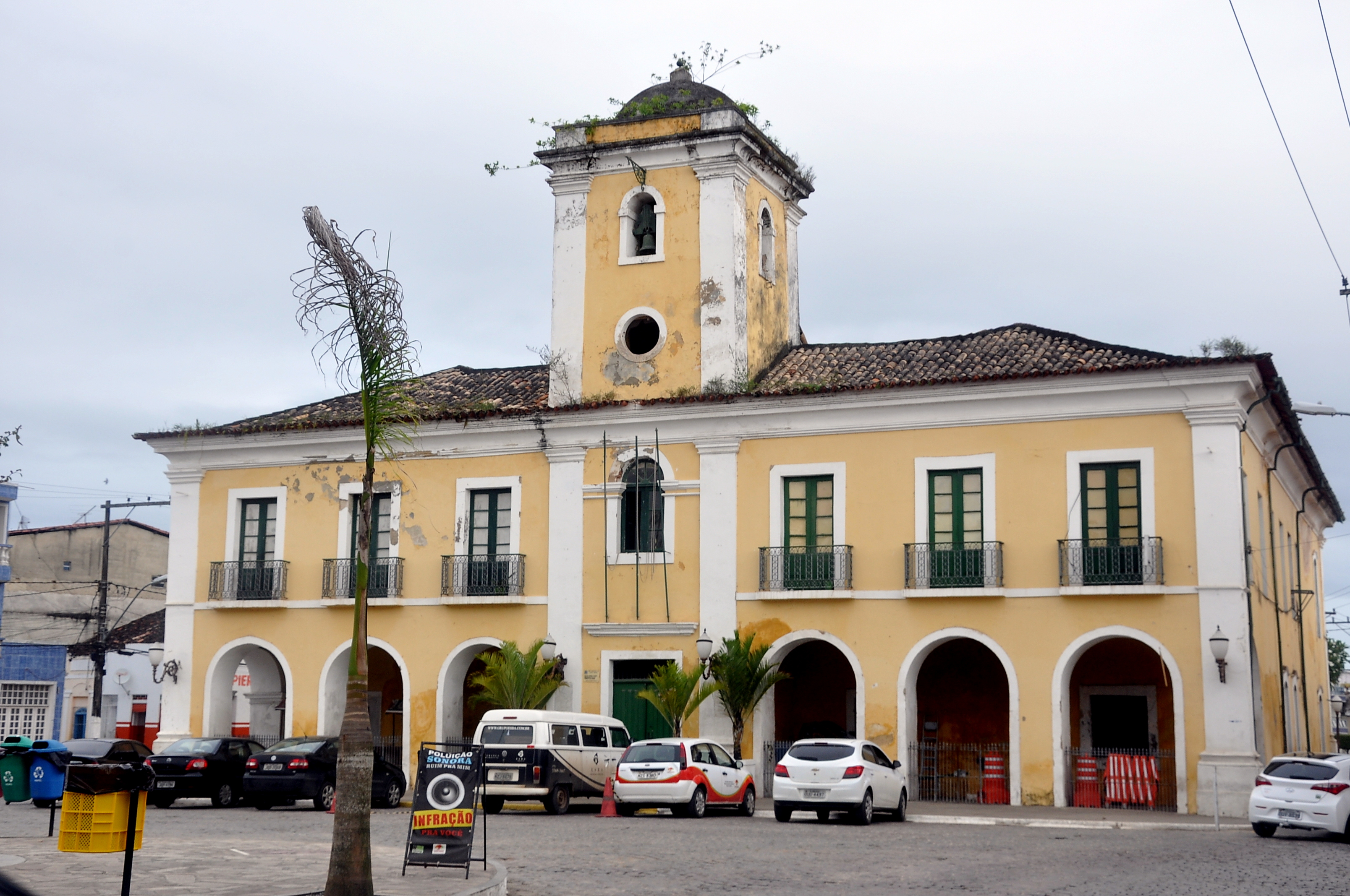 Santo Amaro da Purificação Ba. Foto: Rita Barreto - Bahiatursa